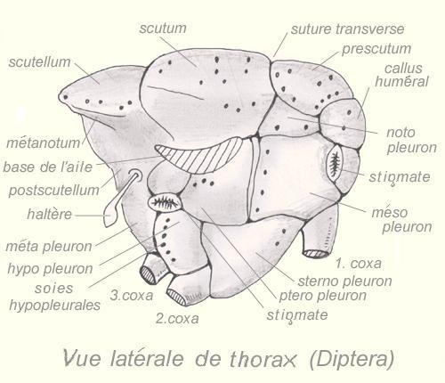 Thorax d'un diptère en vue latérale?